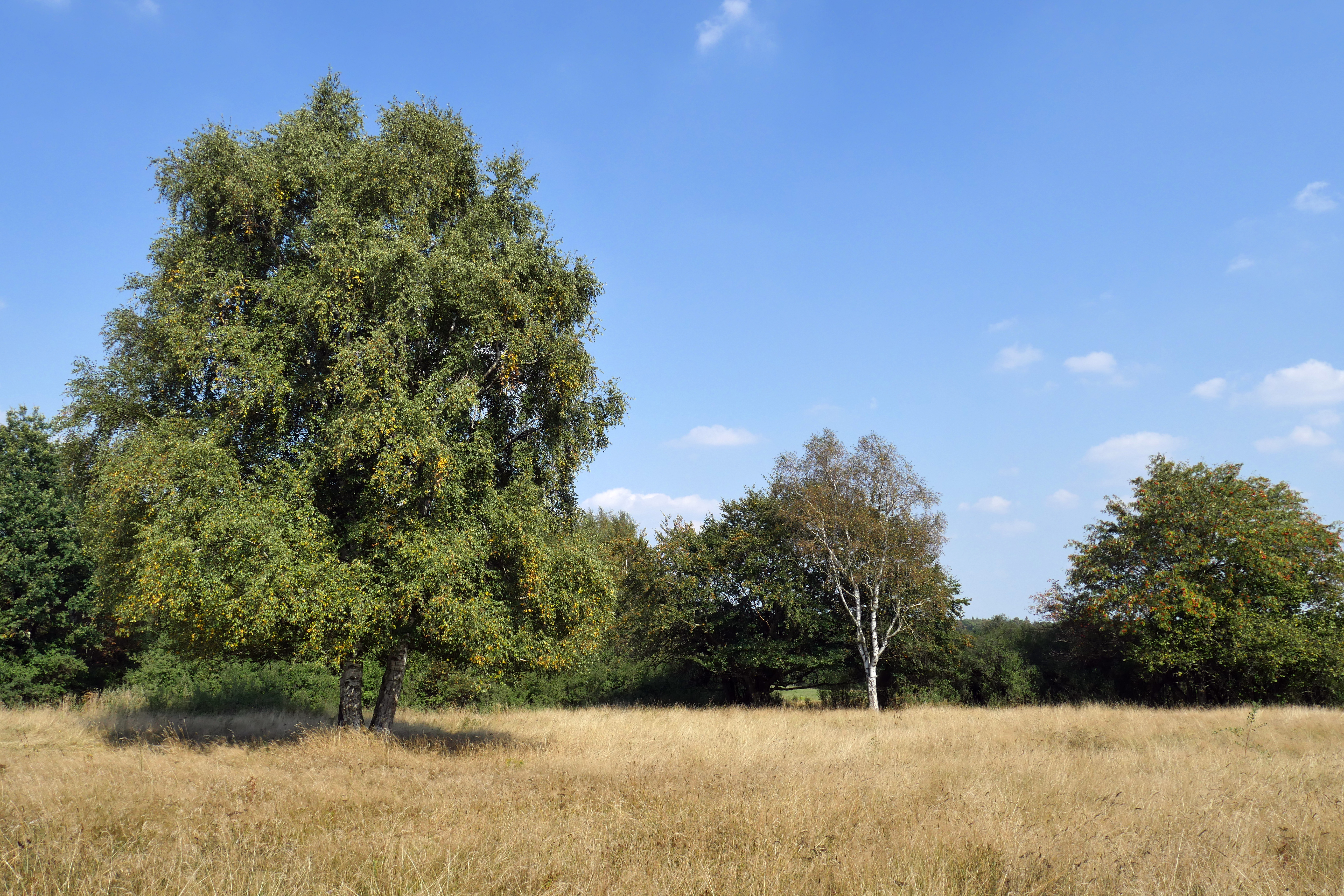 Bergwiese zwischen Siege und Albrechtshaus